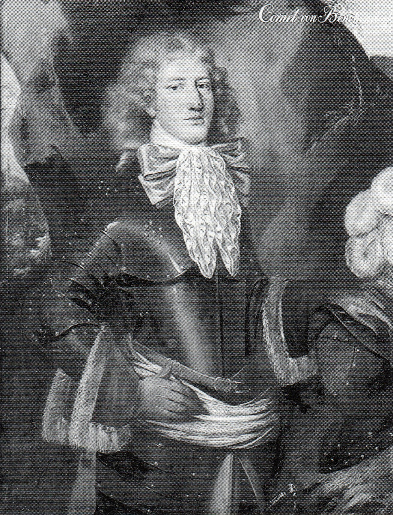 Christoph Friedrich von Benneckendorf.